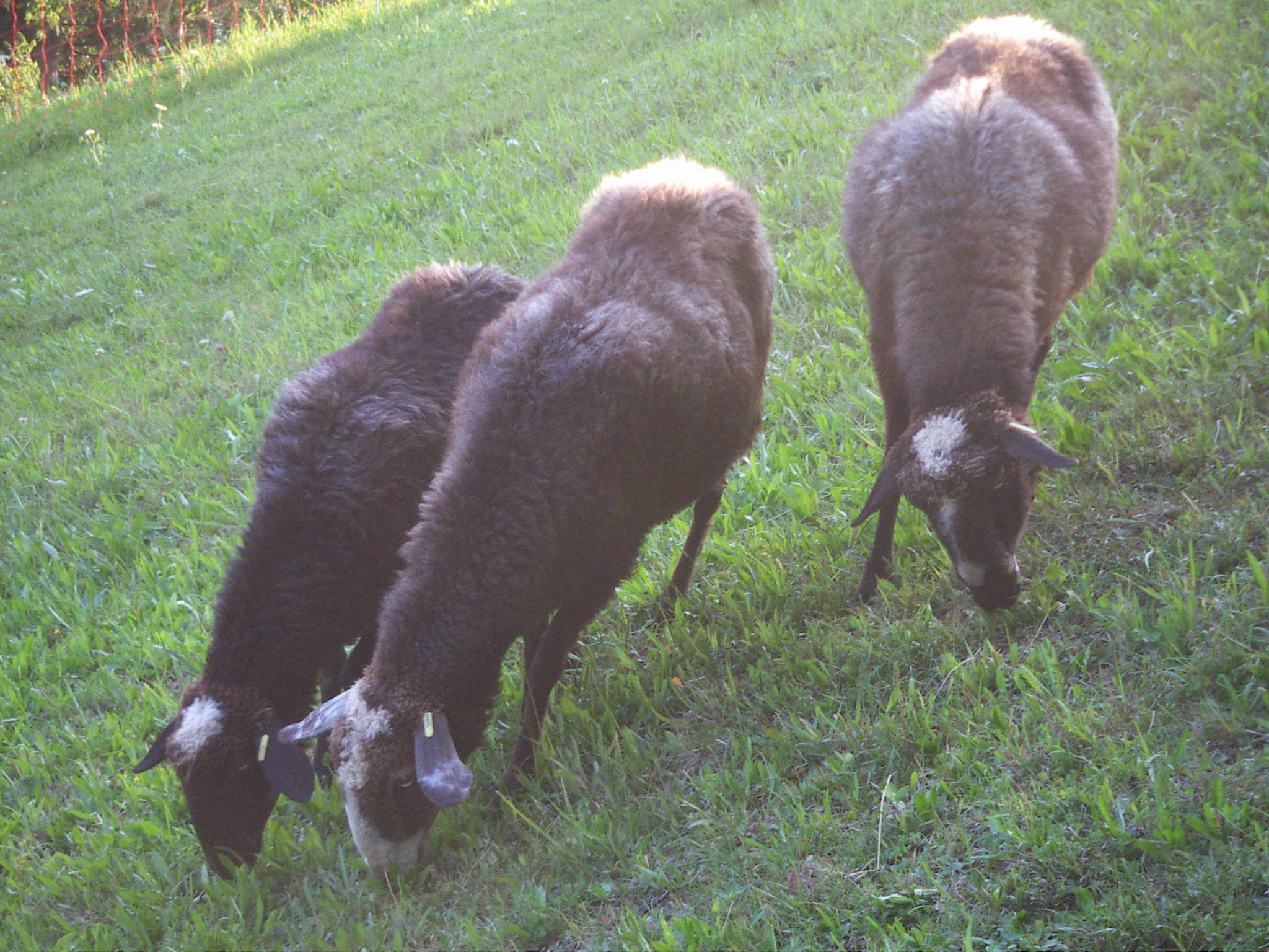 Montafoner Steinschaf, Bartholomäberg